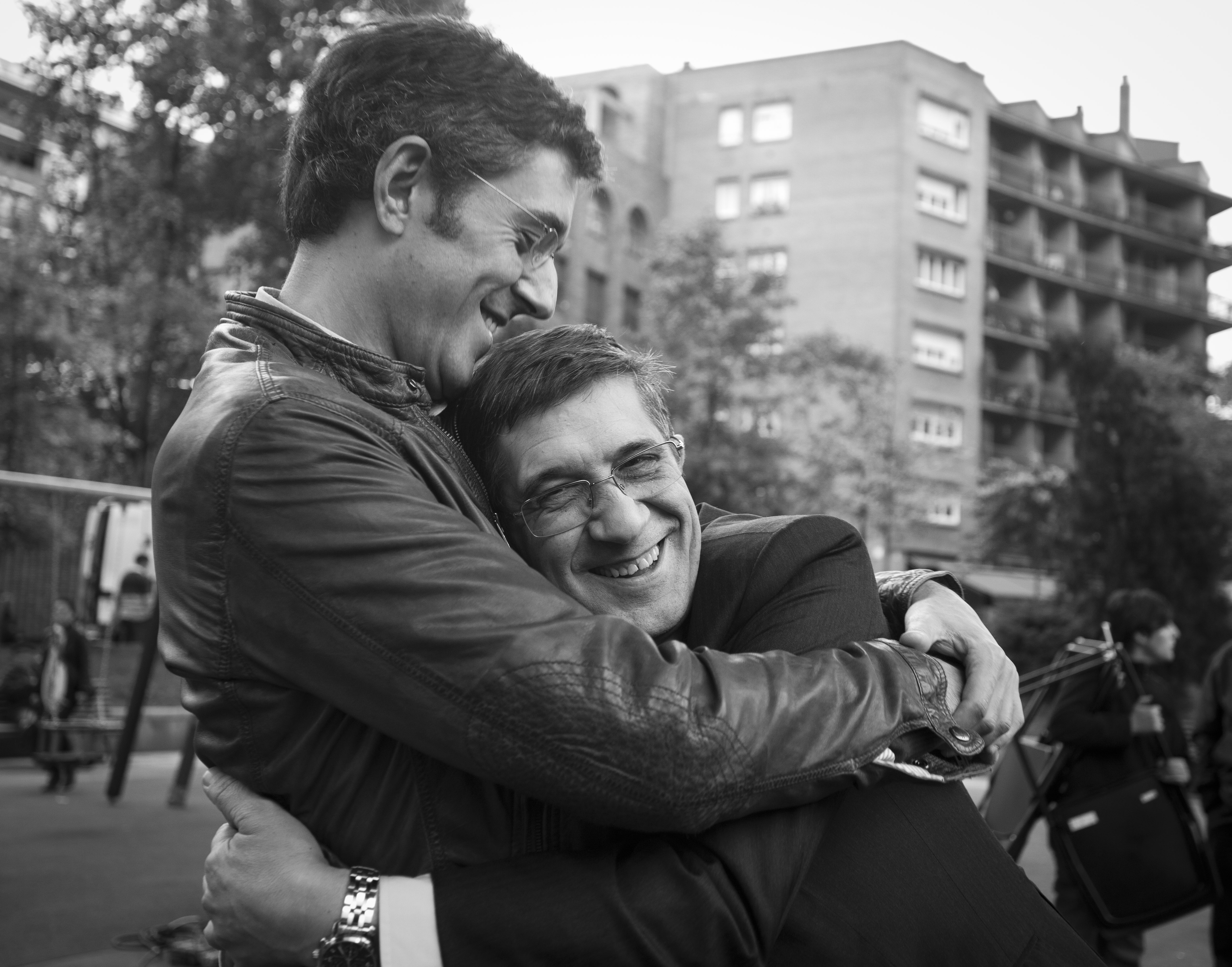 Les socialistes basques Patxi López et Eduardo Madina en octobre 2012.